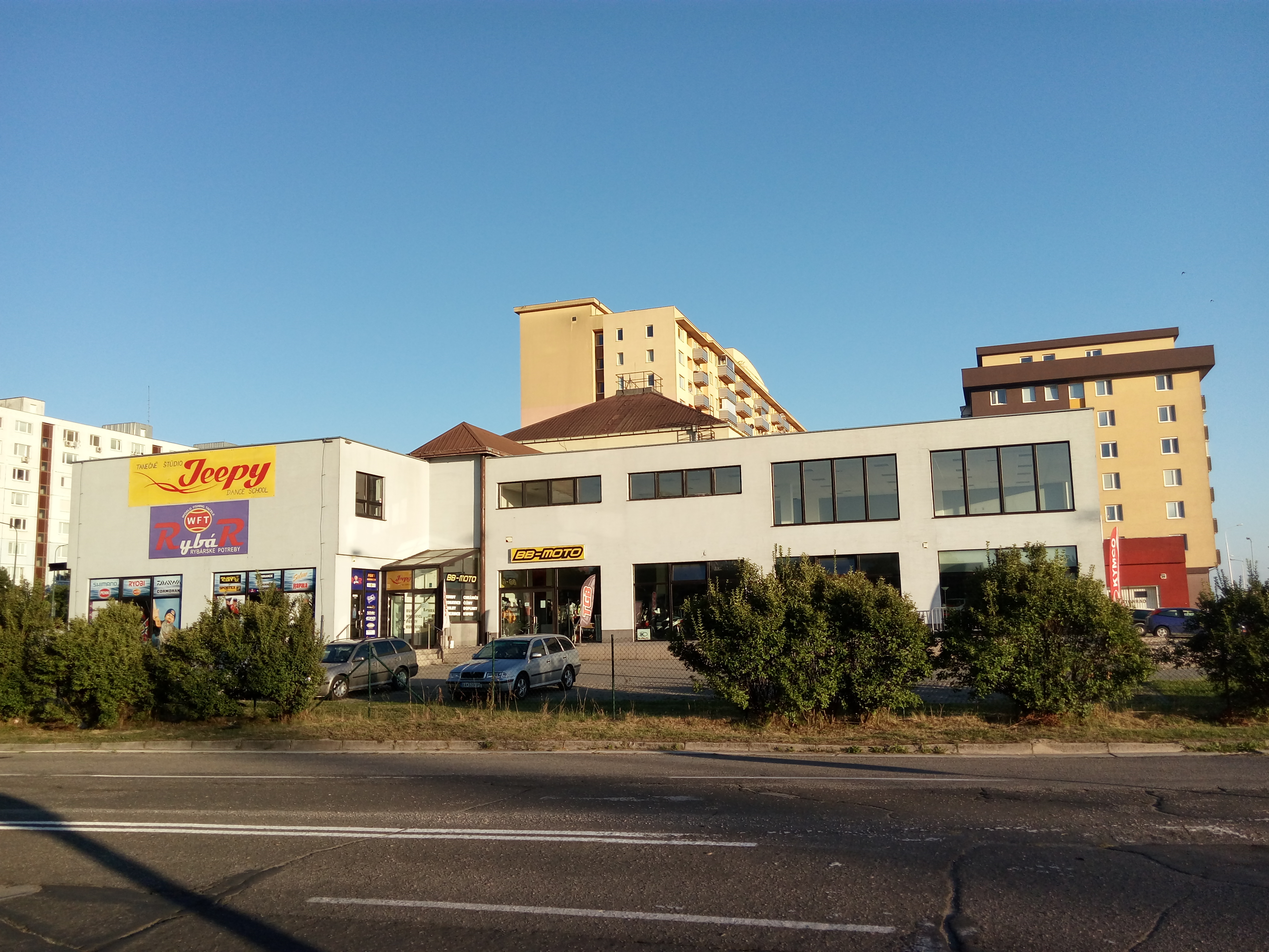 Vyšehradská 4, Petržalka, Bratislava